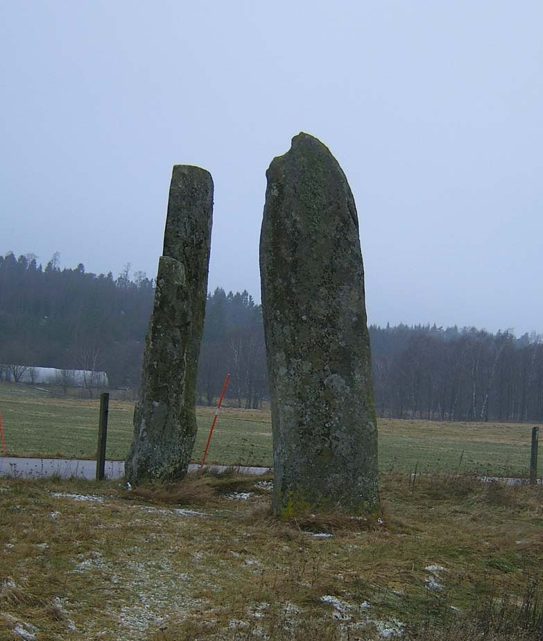 Det ena stenparet som utgör en del av Hagbards galge.